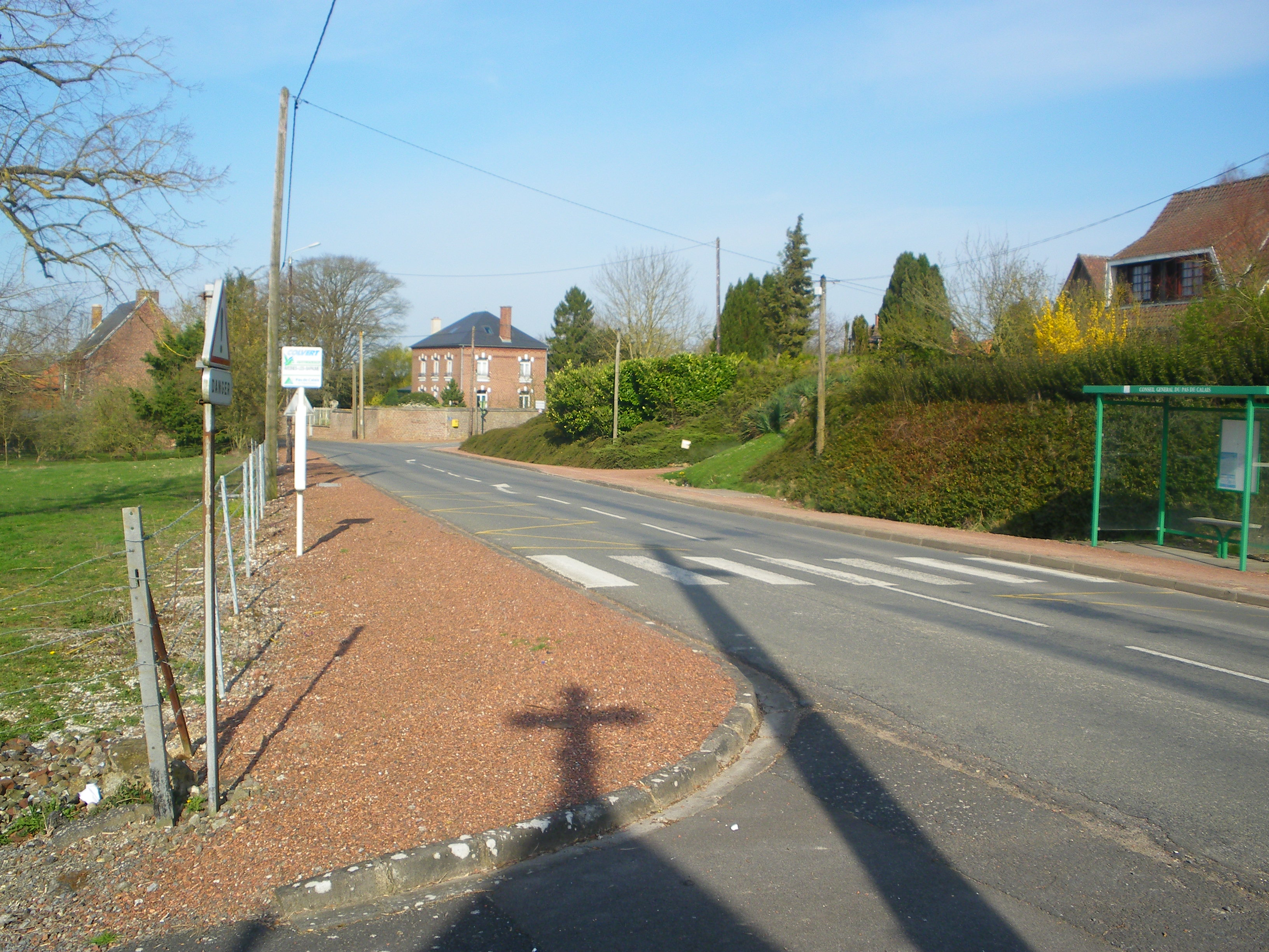 Vue d'Avesnes-lès-Bapaume.